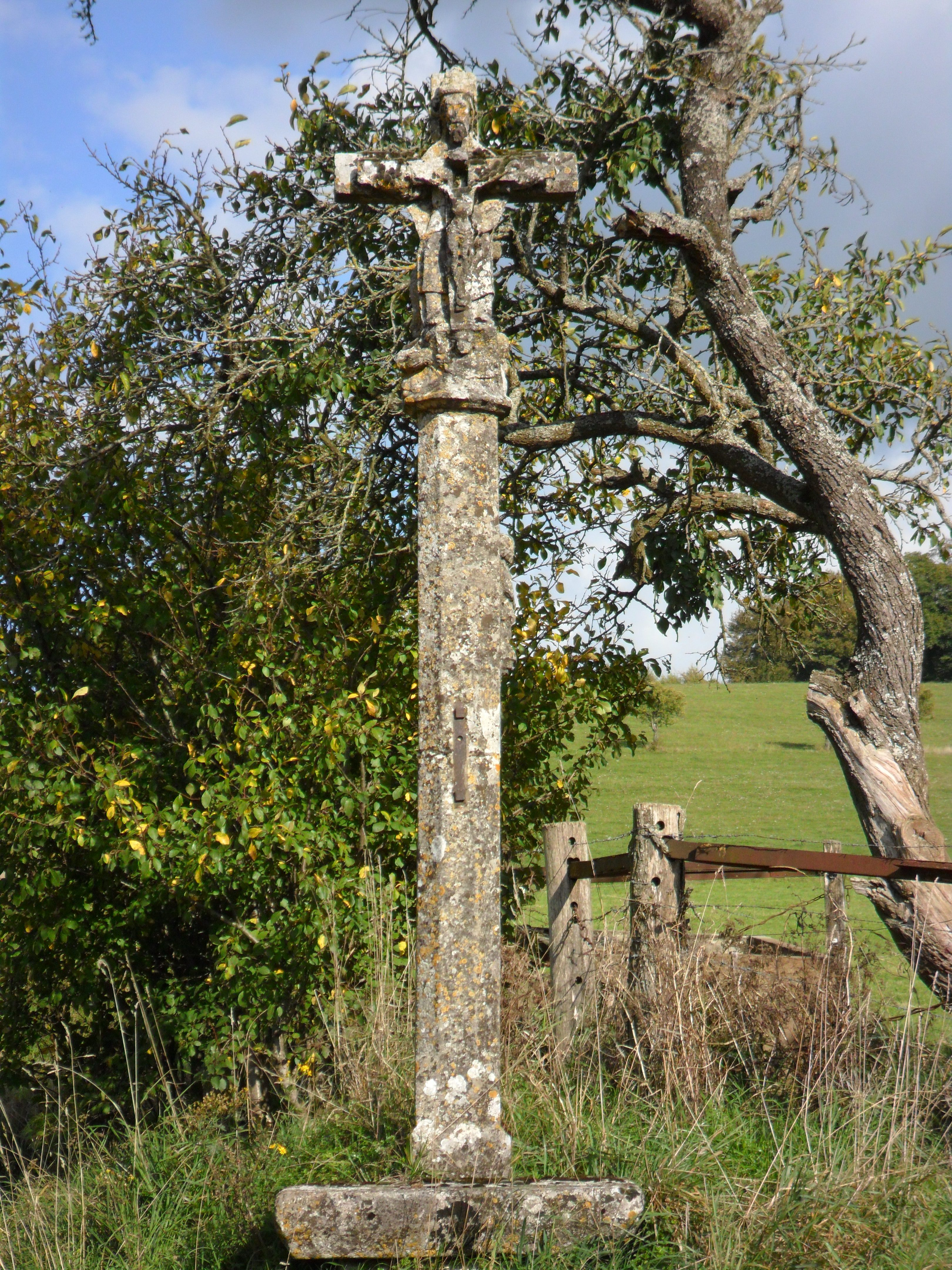 Croix de chemin de Courcelles-sous-Châtenois .